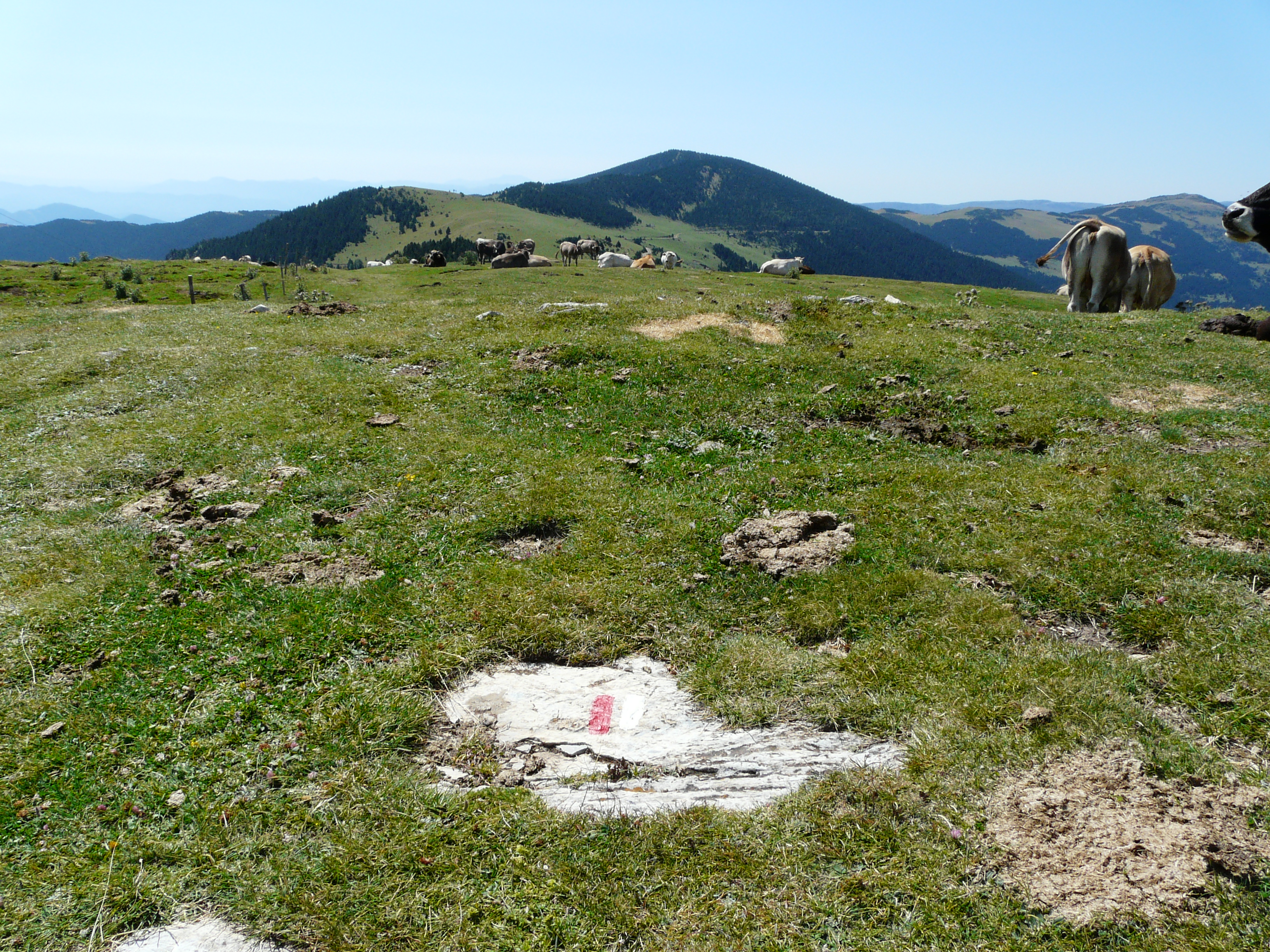 Fotografia presa en una excursió de la Collada Fonda al Costabona.